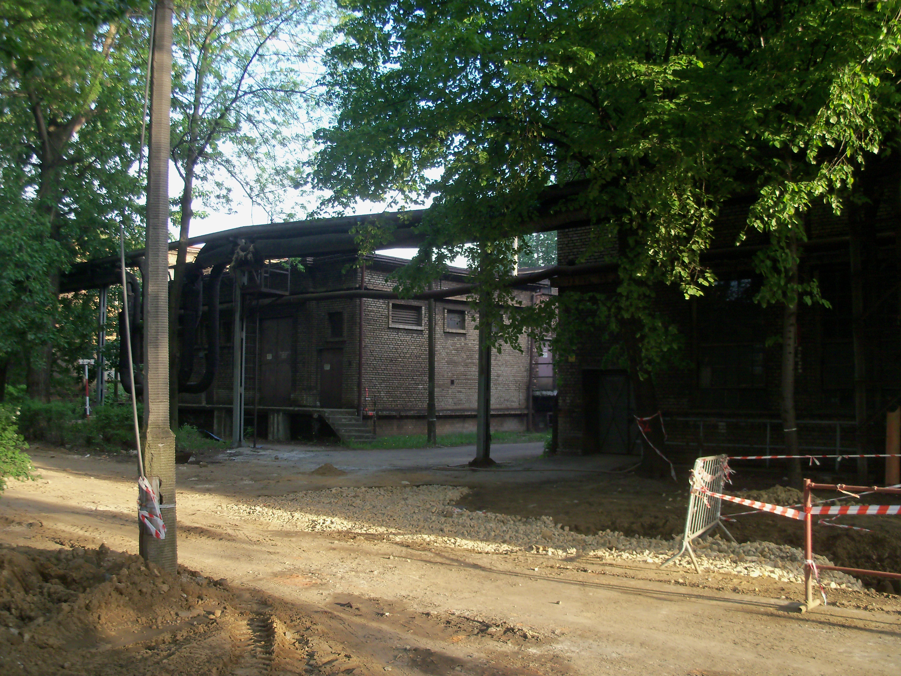 Huta Baildon w Katowicach